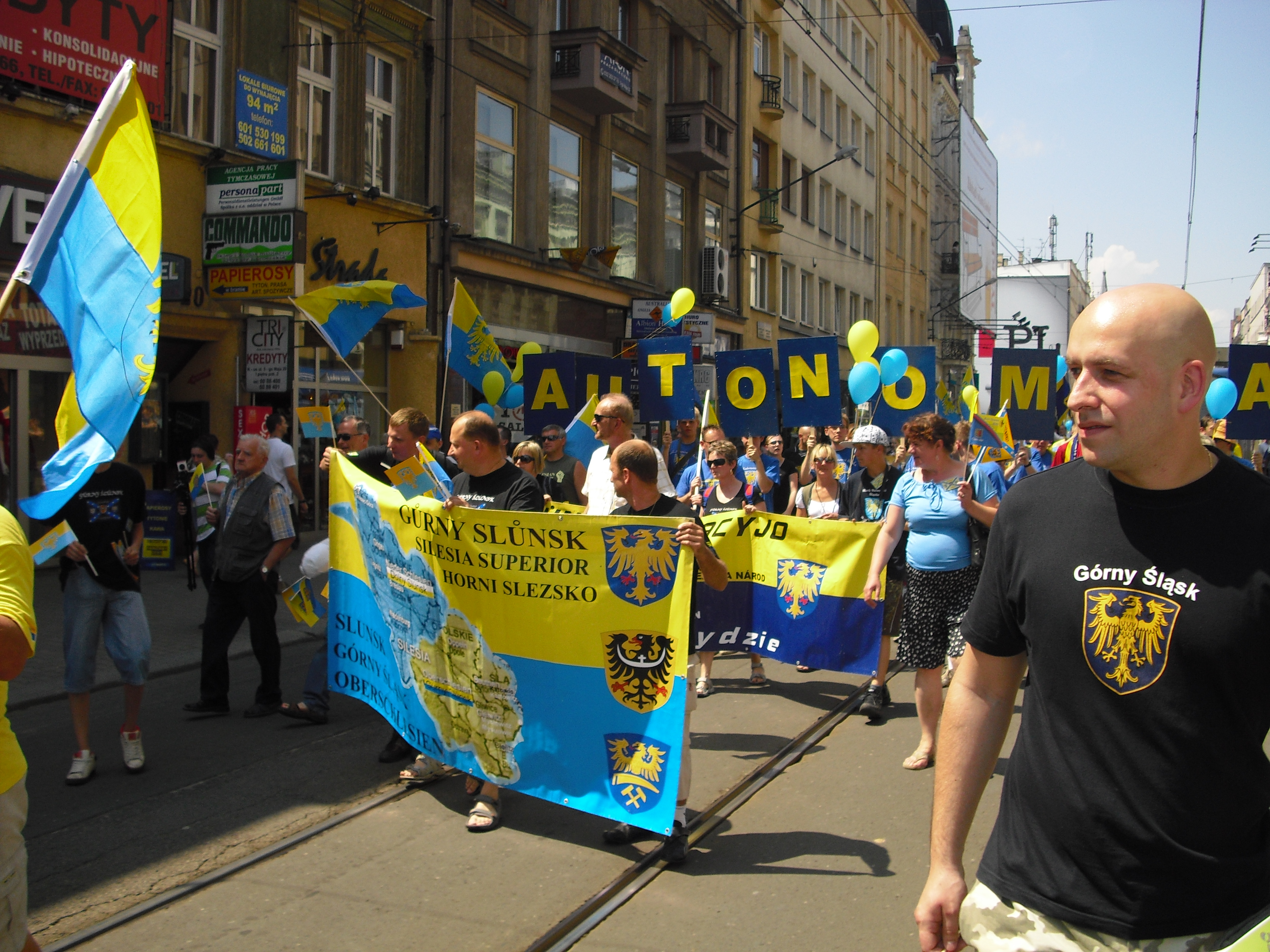 III Marsz Autonomii, Katowice, 18.07.2009